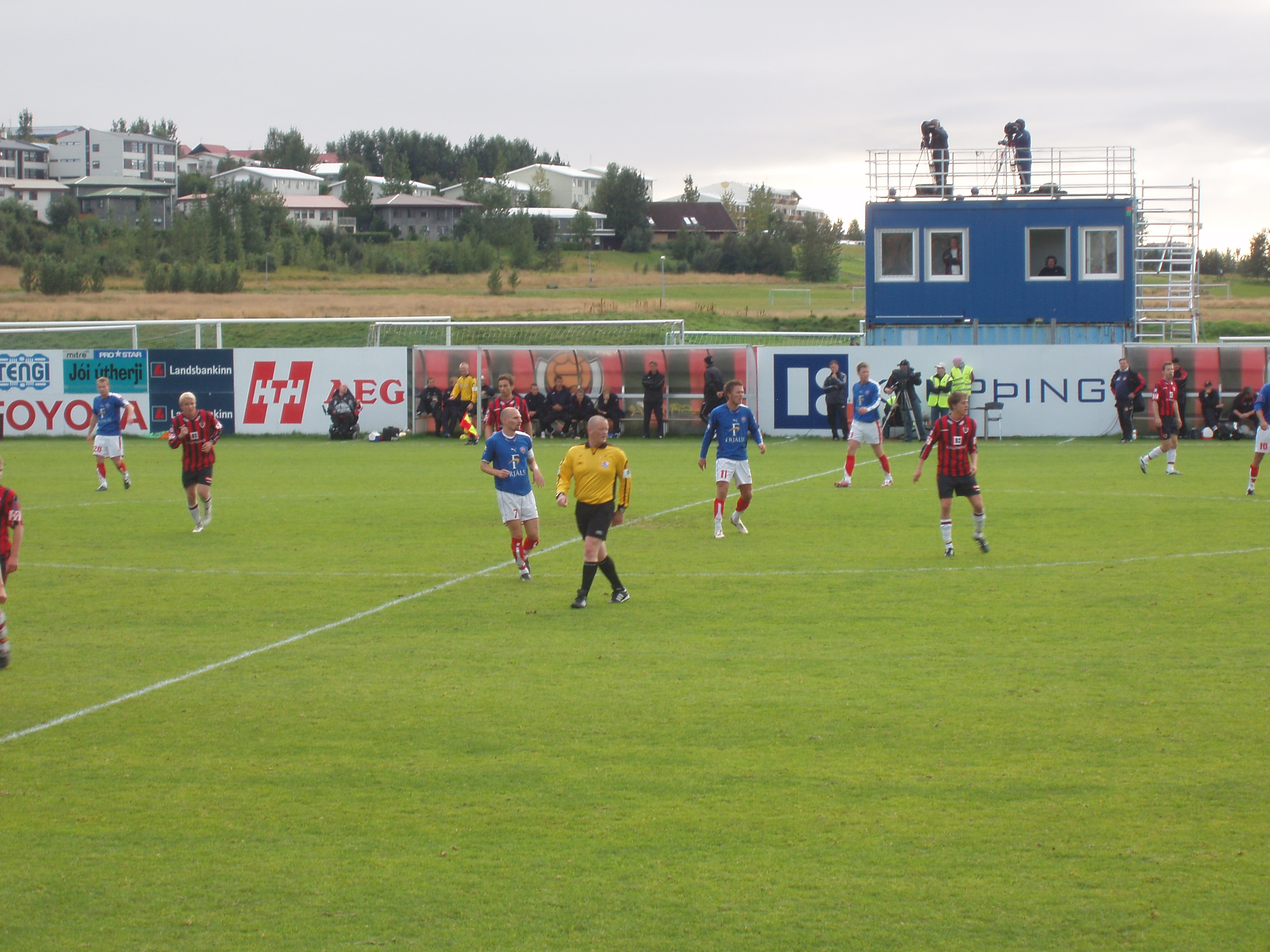 Soccer Vikingur vs Valur, Iceland